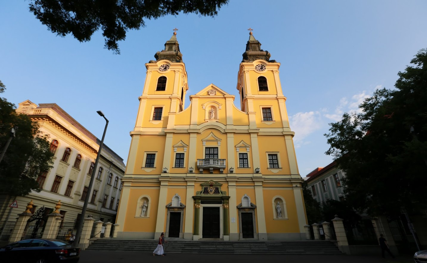 Szent Anna-templom Debrecenben